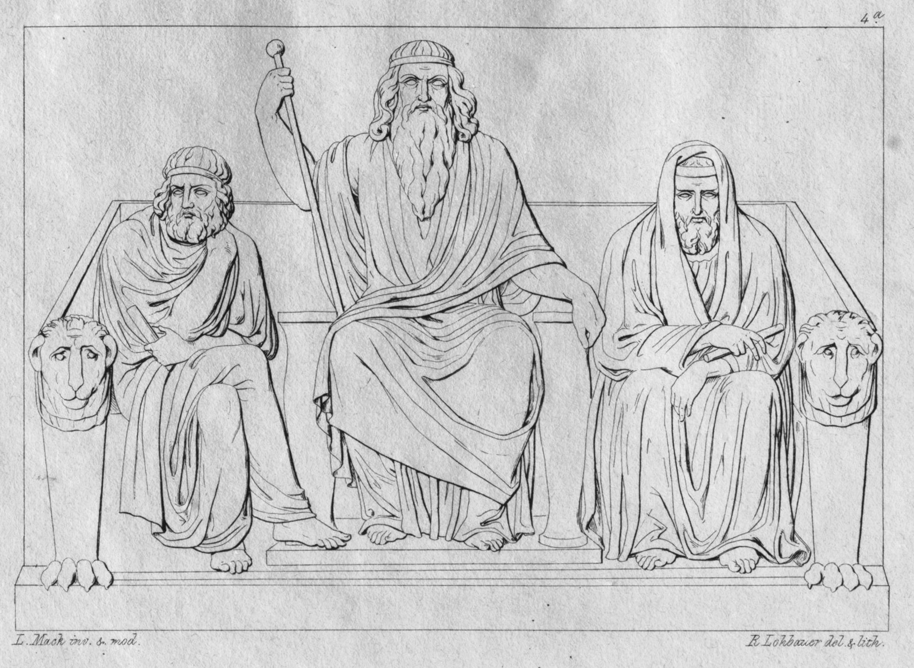 Ludwig Mack / Lithograph: Rudolph Lohbauer: Die Unterwelt (zwischen 1824 und 1829), Ausschnitt mitte: Das Totengericht. Flachrelief, Verbleib unbekannt. Die Totenrichter Minos, Aiakos (mit dem Szepter), Rhadamanthys sitzen auf der Thronbank und befragen die Schatten nach ihrem Leben und ihren Taten.